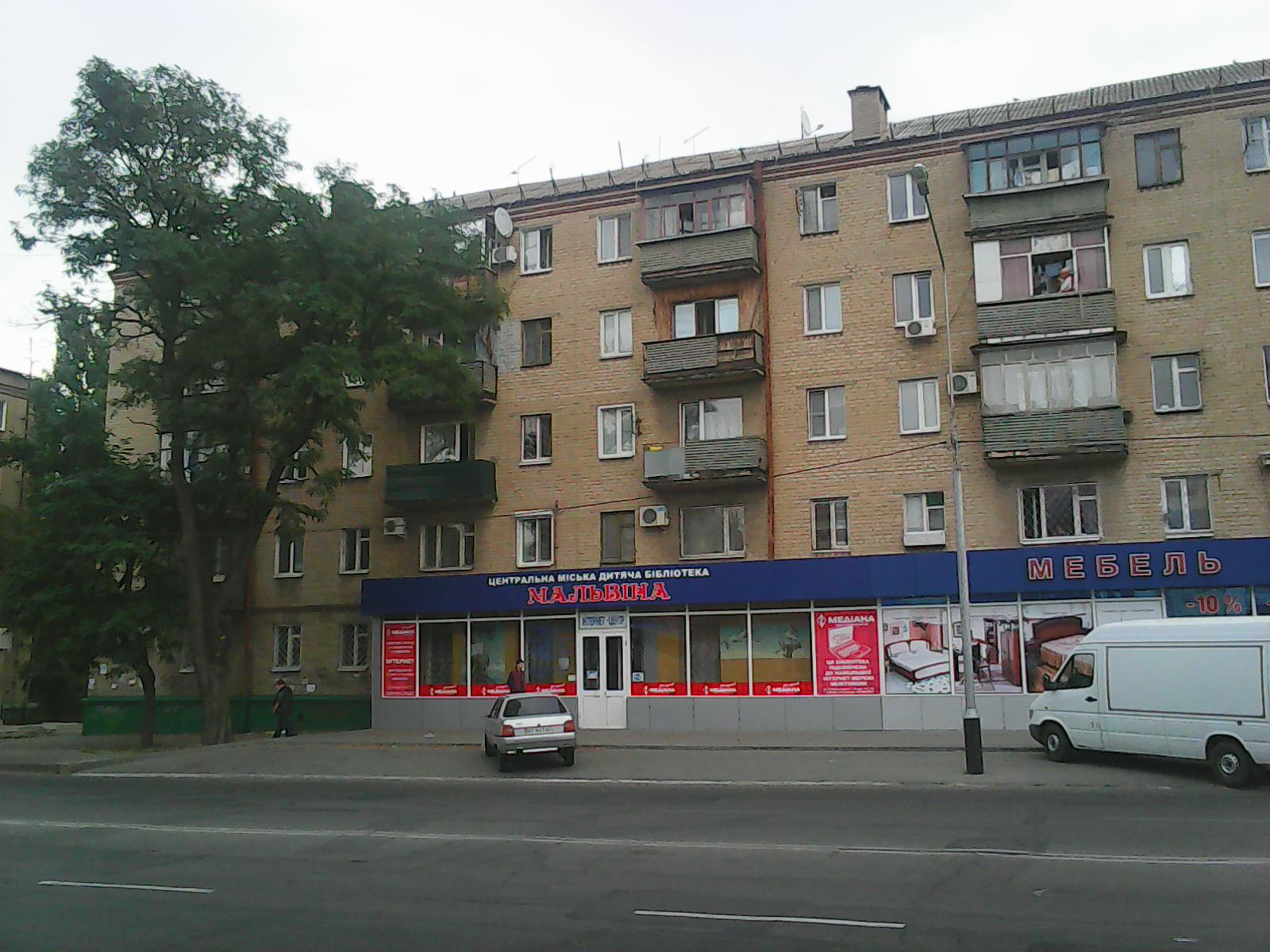 Мелитополь